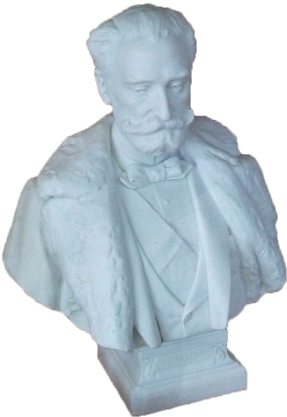 Présent au Musée des beaux-arts et d'archéologie de Châlons-en-Champagne. lors d'une exposition temporaire.